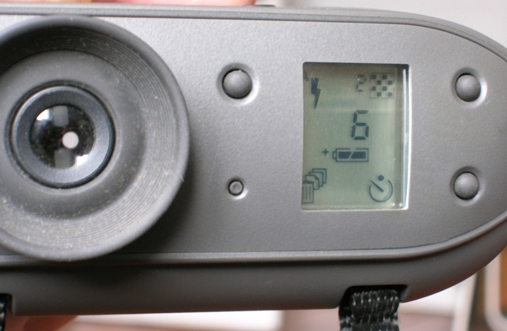 arrière du Quicktake 100. Le tableau de commande